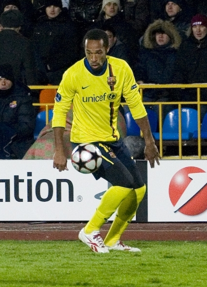 Thierry Henry, en Liga de Campeones frente al Rubin Kazan.